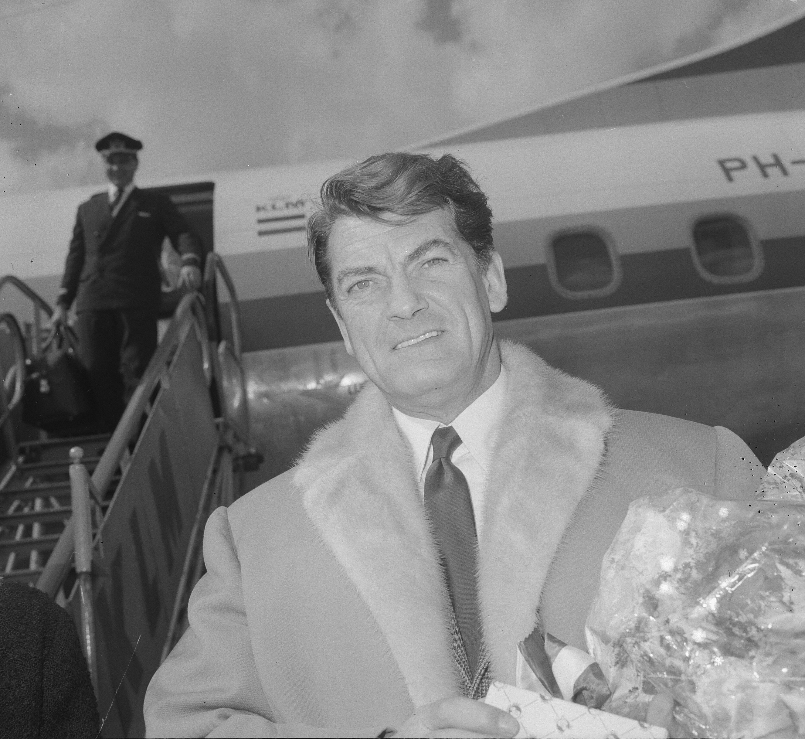 Collectie / Archief : Fotocollectie Anefo Reportage / Serie : [ onbekend ] Beschrijving : Aankomst Jean Marais op Schiphol, Datum : 13 april 1965 Locatie : Noord-Holland, Schiphol Trefwoorden : aankomsten, acteurs, filmsterren, toneelspelers, vliegvelden Persoonsnaam : Jean Marais Fotograaf : Nijs, Jac. de / Anefo Auteursrechthebbende : Nationaal Archief Materiaalsoort : Negatief (zwart/wit) Nummer archiefinventaris : bekijk toegang 2.24.01.03 Bestanddeelnummer : 917-6464